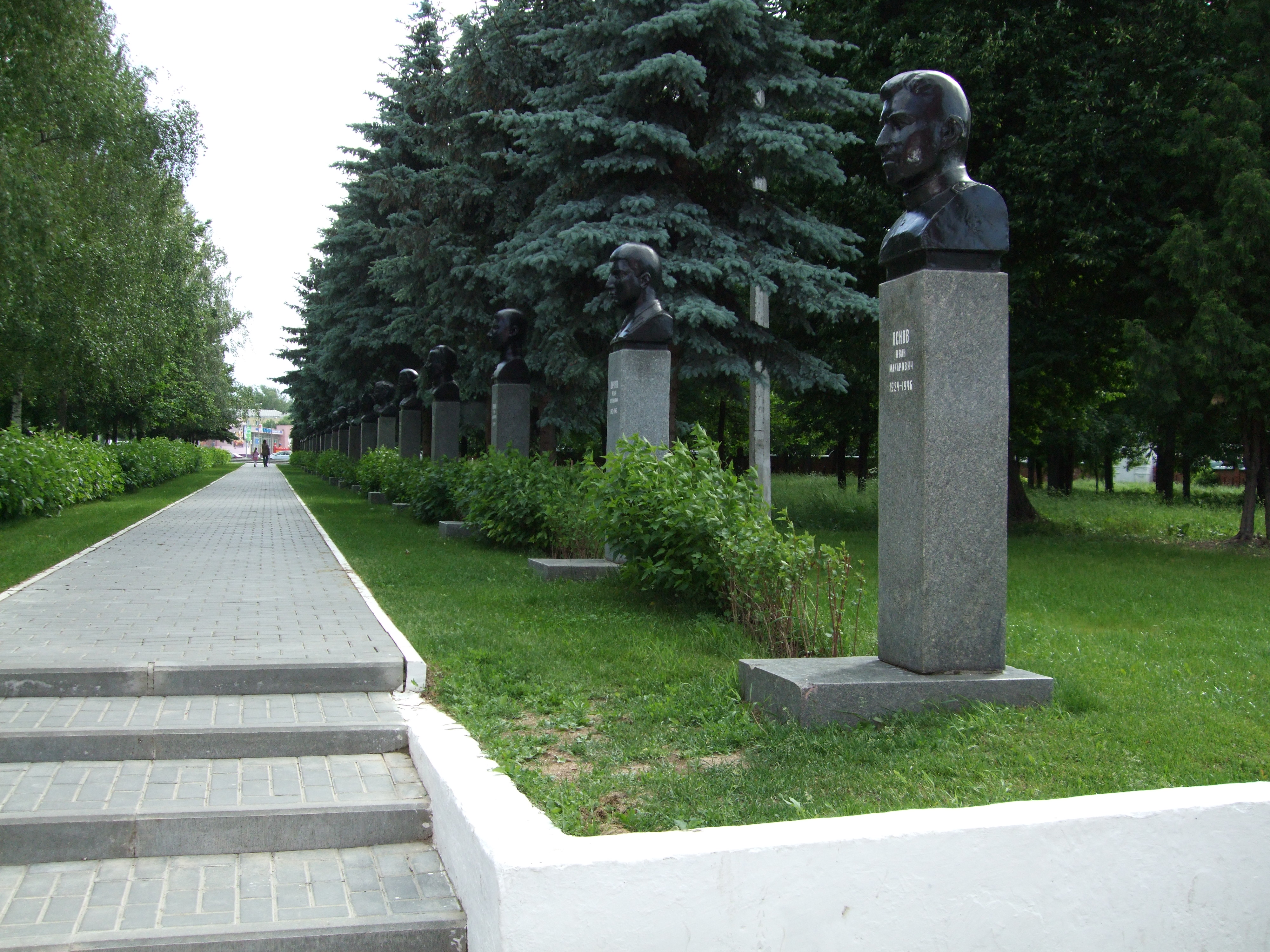 Город Коломна, Мемориальный парк, Аллея Памяти коломенцев-Героев Советского Союза